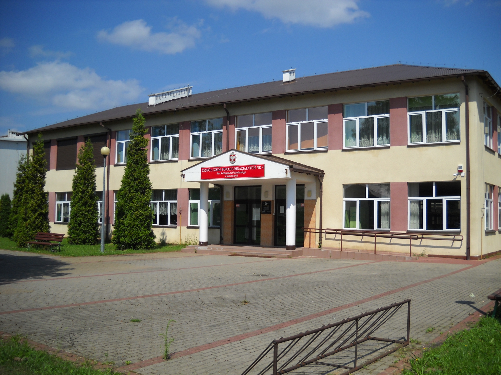 Zespół Szkół Ponadgimnazjalnych nr 3 im. Króla Jana III Sobieskiego